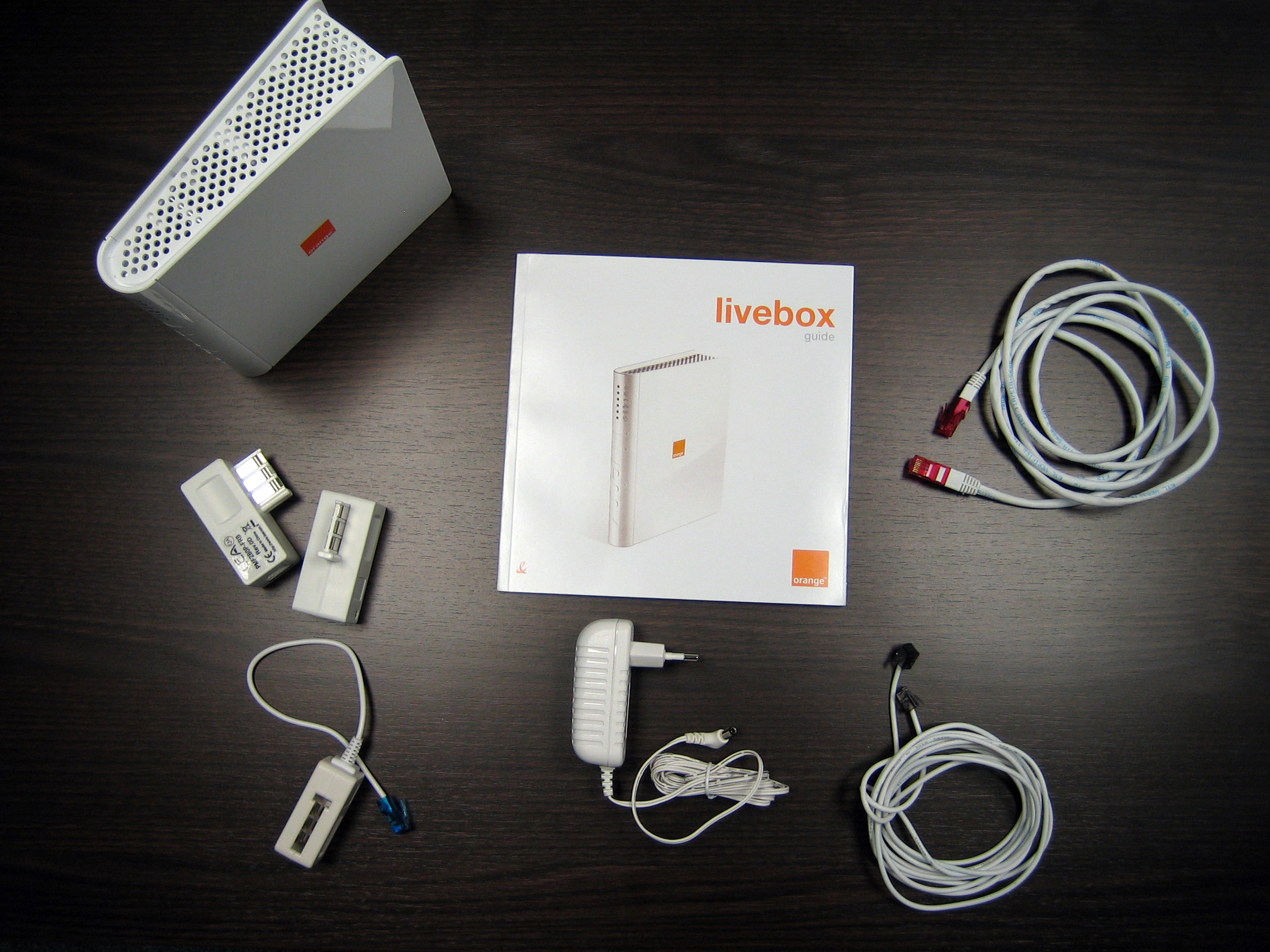 elements du pack de la livebox 1.2